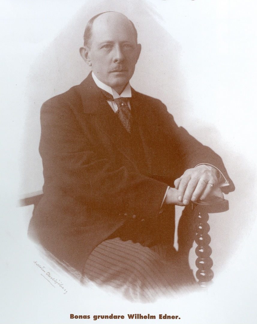 Wilhelm Edner como fundador de Bona